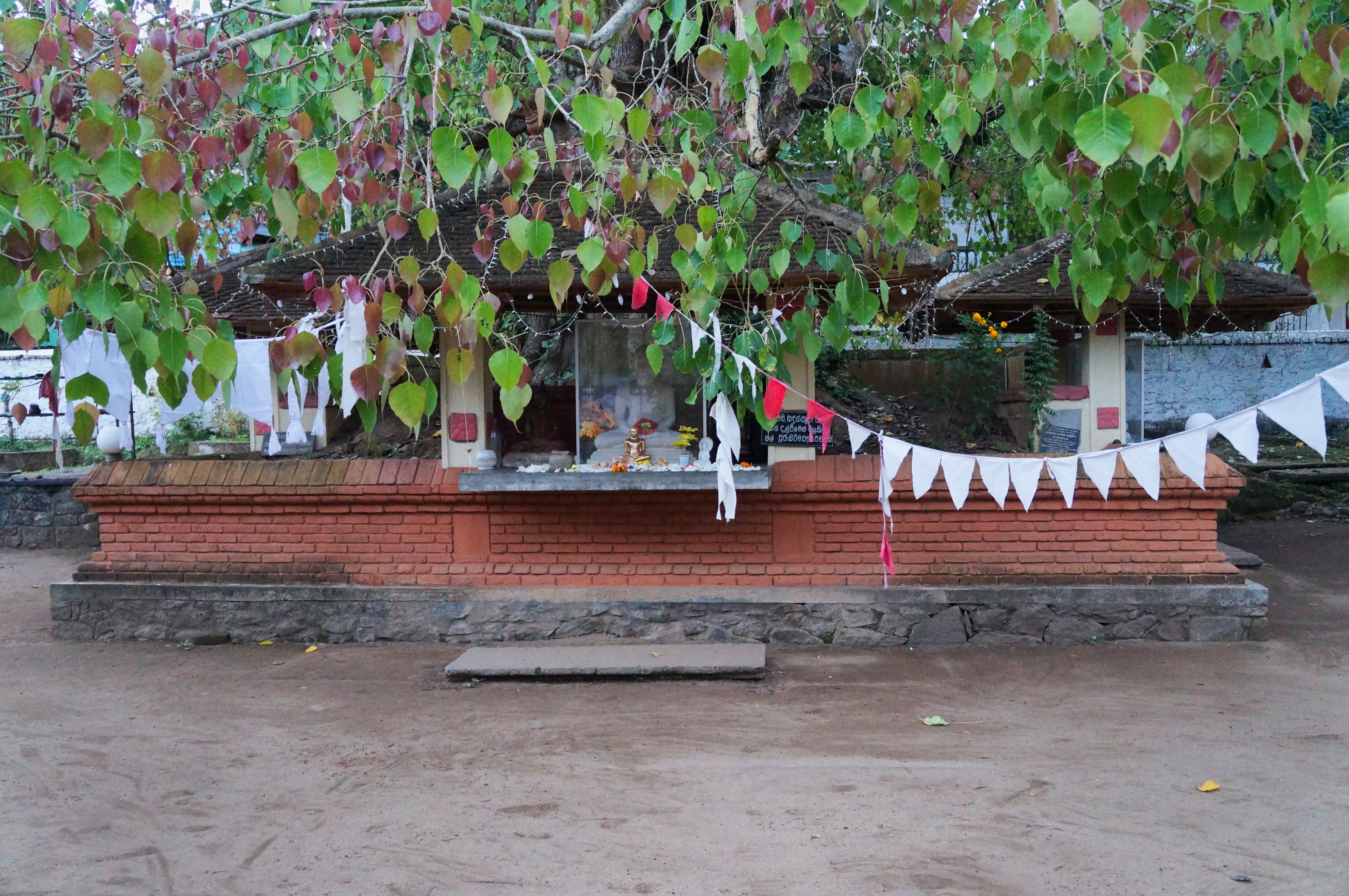 Le temple Embekka Devalaya à Kandy Sri Lanka.- Asie du Sud